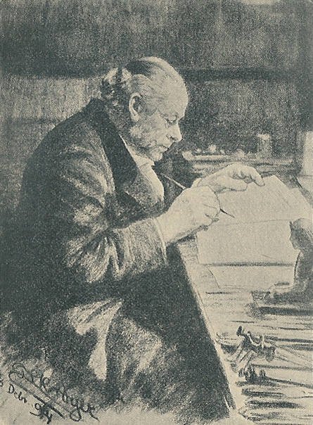 Rudoplh Bergh. Tegning af P.S. Krøyer fra 1894.